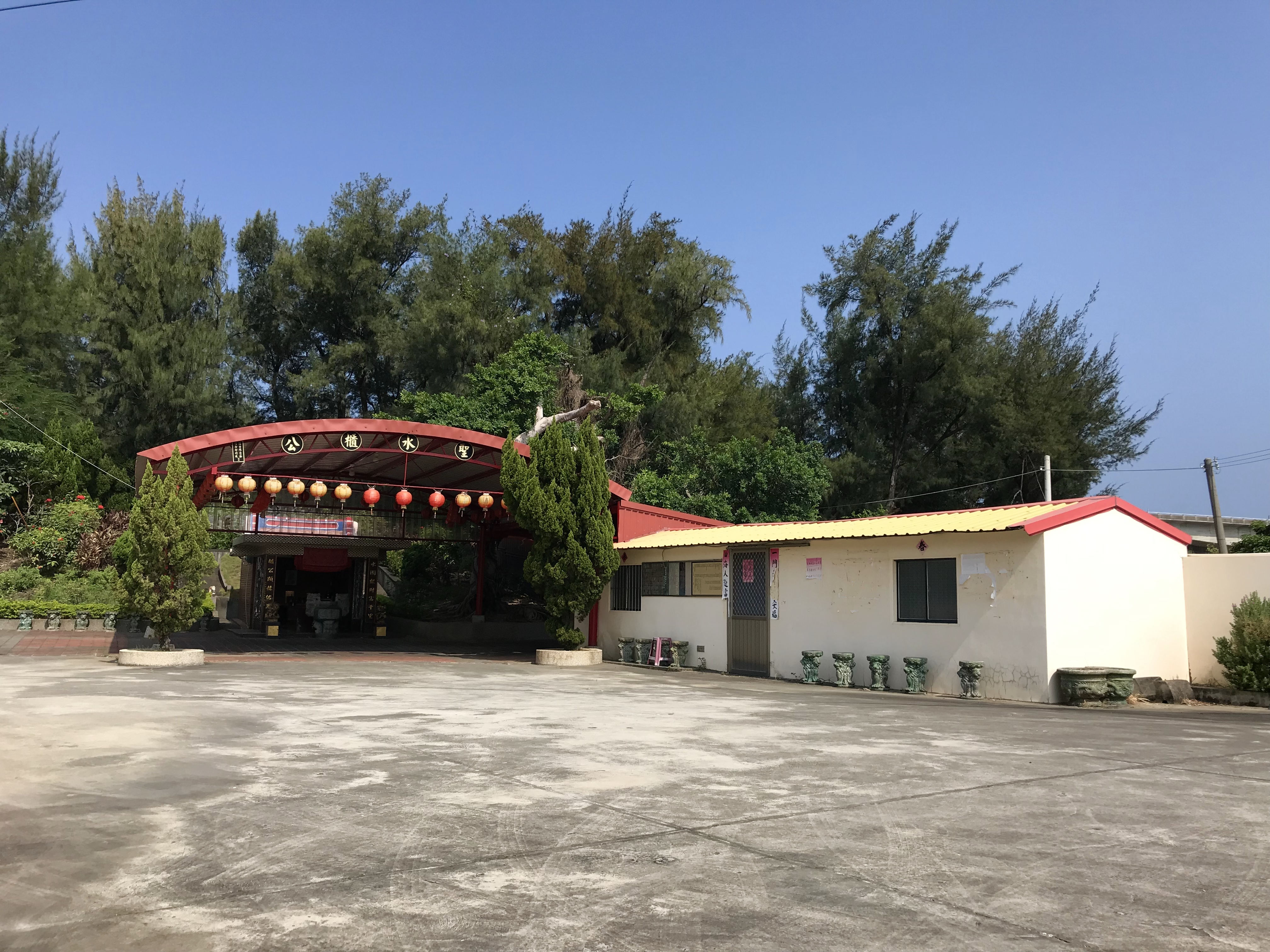 三聖水櫃公廟斜照